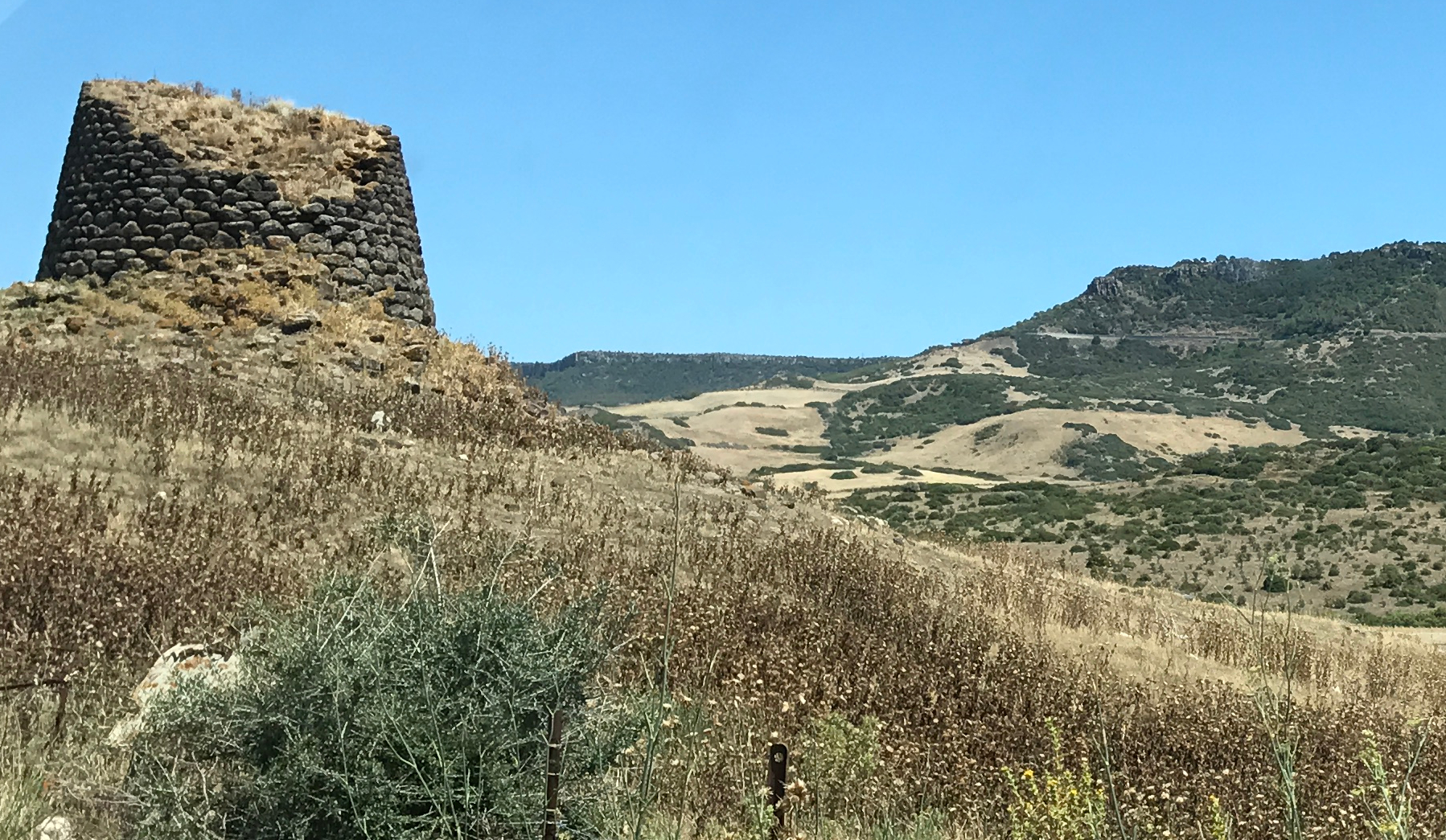 Le nuraghe Paddaggiu (Castelsardo) photographié depuis la route.